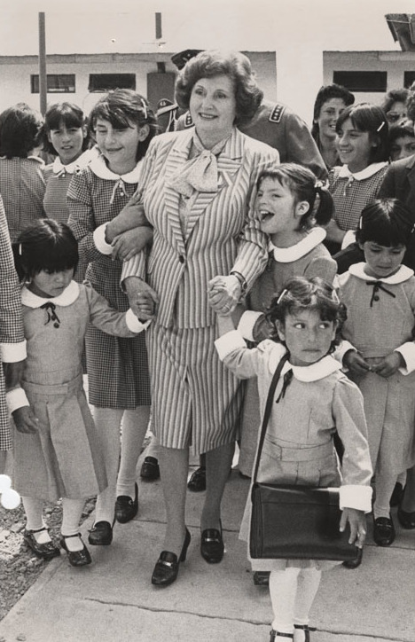 1984. Gira del Presidente a la Carretera Longitudinal Austral: Sra. del Presidente, Lucía Hiriart de Pinochet rodeada de niñas escolares de distintas edades.